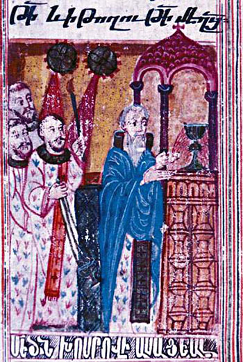 Երևան, ձեռ. 7804, էջ 14բ, Խորհրդատետր, 1714 թ., Թոխաթ